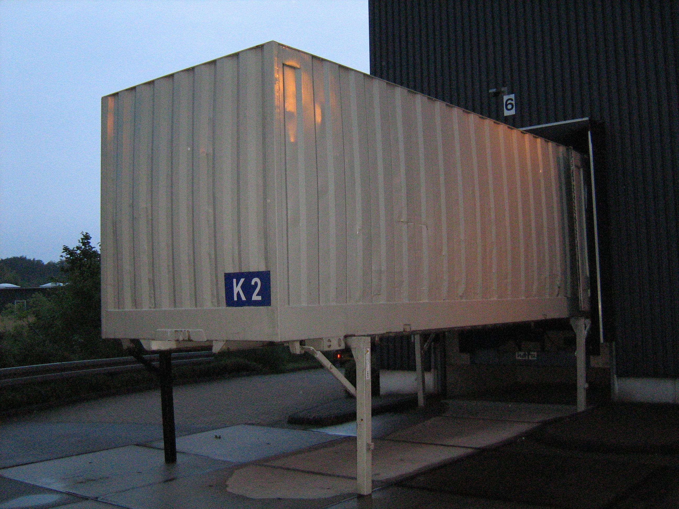 Wechselbrücken-Kofferaufbau inkl. Brückengestell